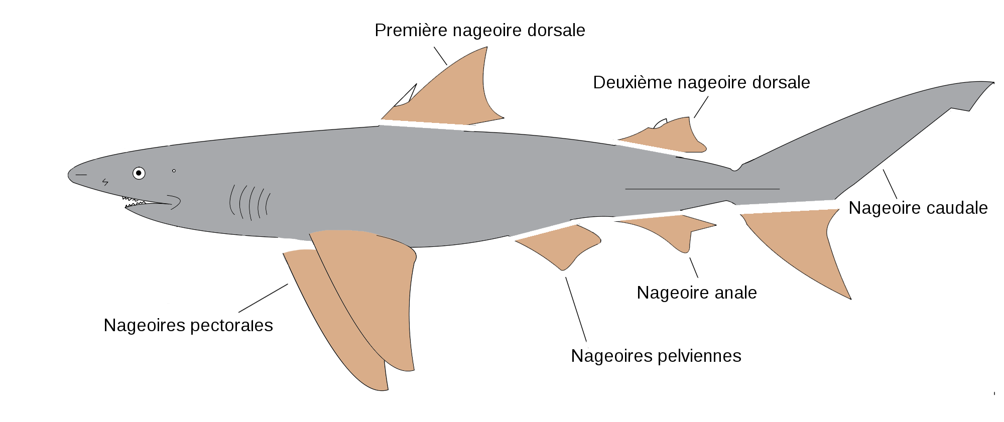 Description externe de l'anatomie d'un requin